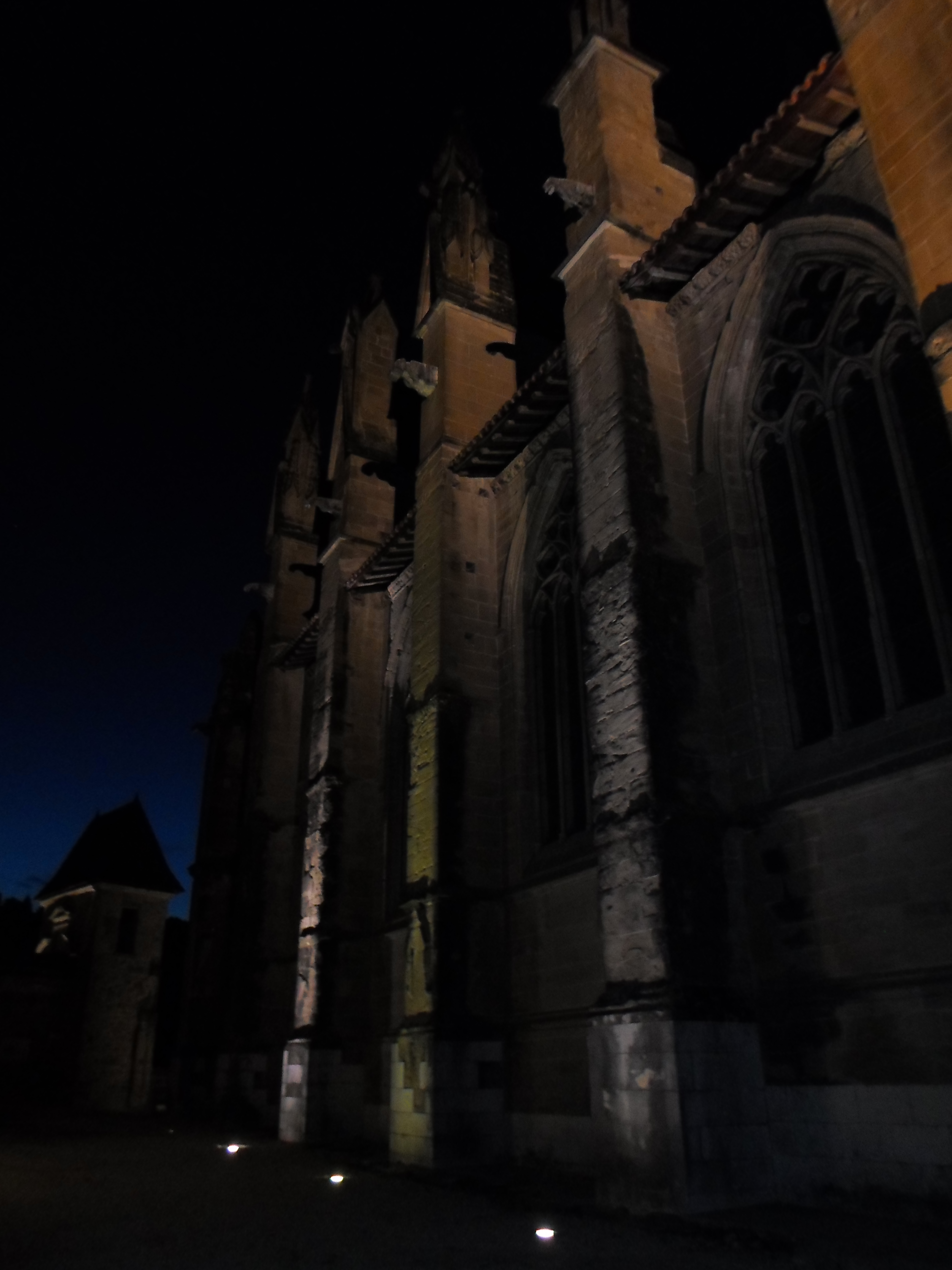 Église Notre-Dame de la Jayère Eglise Saint-Antoine-l'Abbaye by night 38160 PA38000020 VAN DEN HENDE ALAIN CC -BY-SA 4 0 0501205 .